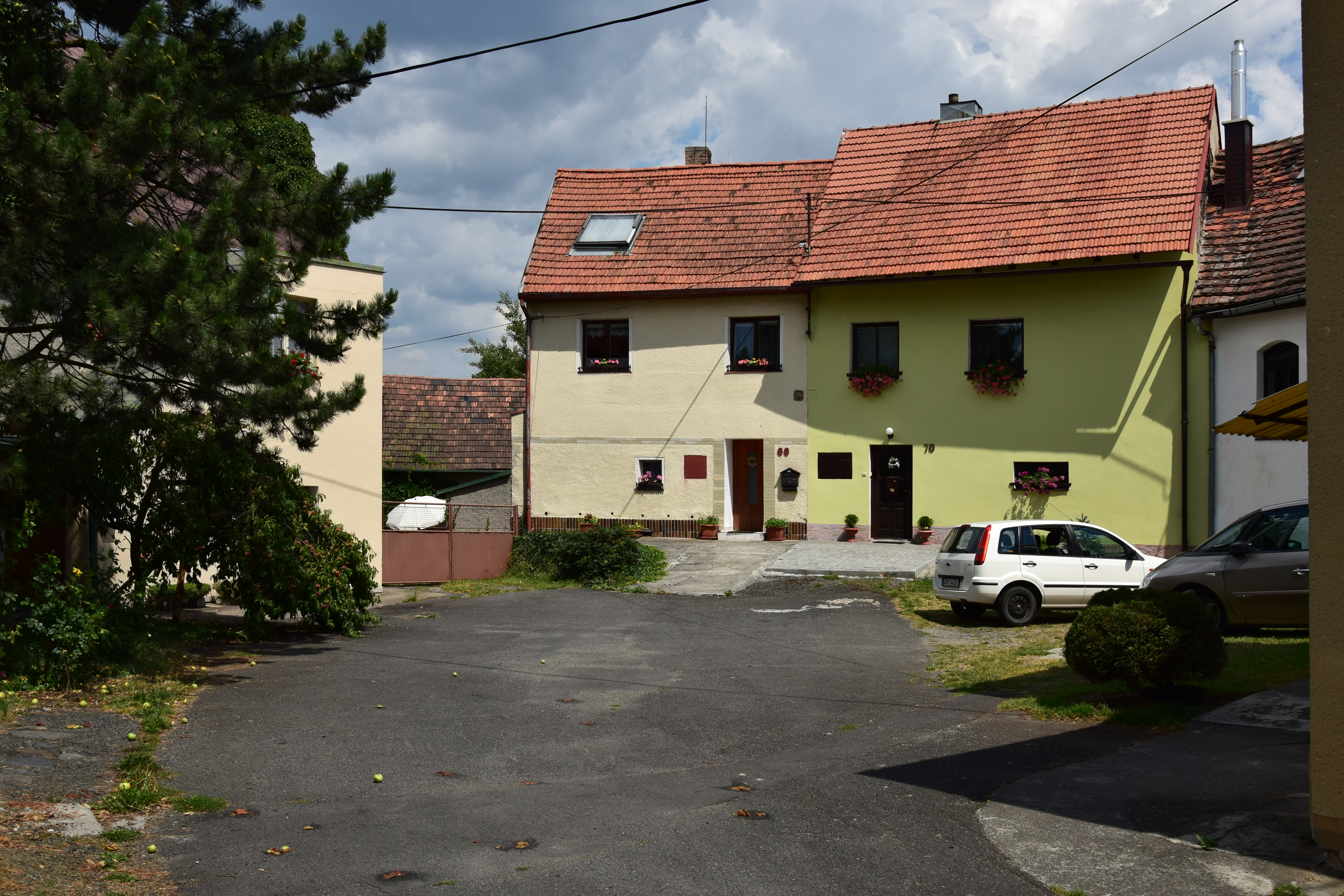 Svrčovec – prostor tvrziště obestavěný domy